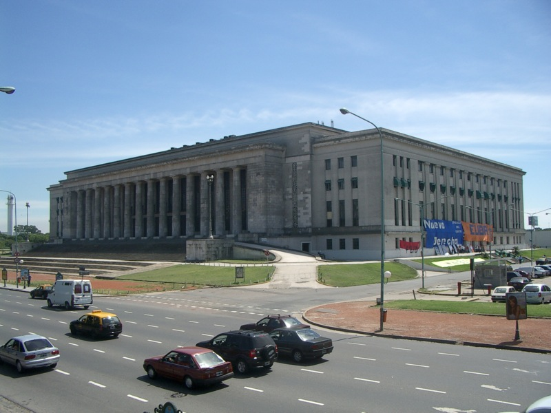 Edificio de la Facultad de Derecho de la Facultad de Buenos Aires, ubicado en el barrio porteño de Recoleta